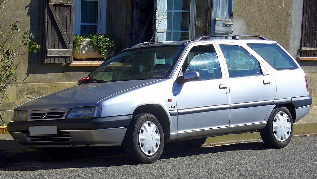 Citroën ZX